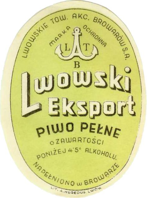 Etykieta piwa Lwowski Eksport z okresu międzywojennego